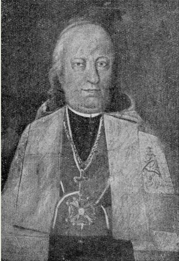 Maksymilian Ryłło (ok. 1715-1793), unicki biskup chełmski (1759-1784) i przemyski (1784-1793)